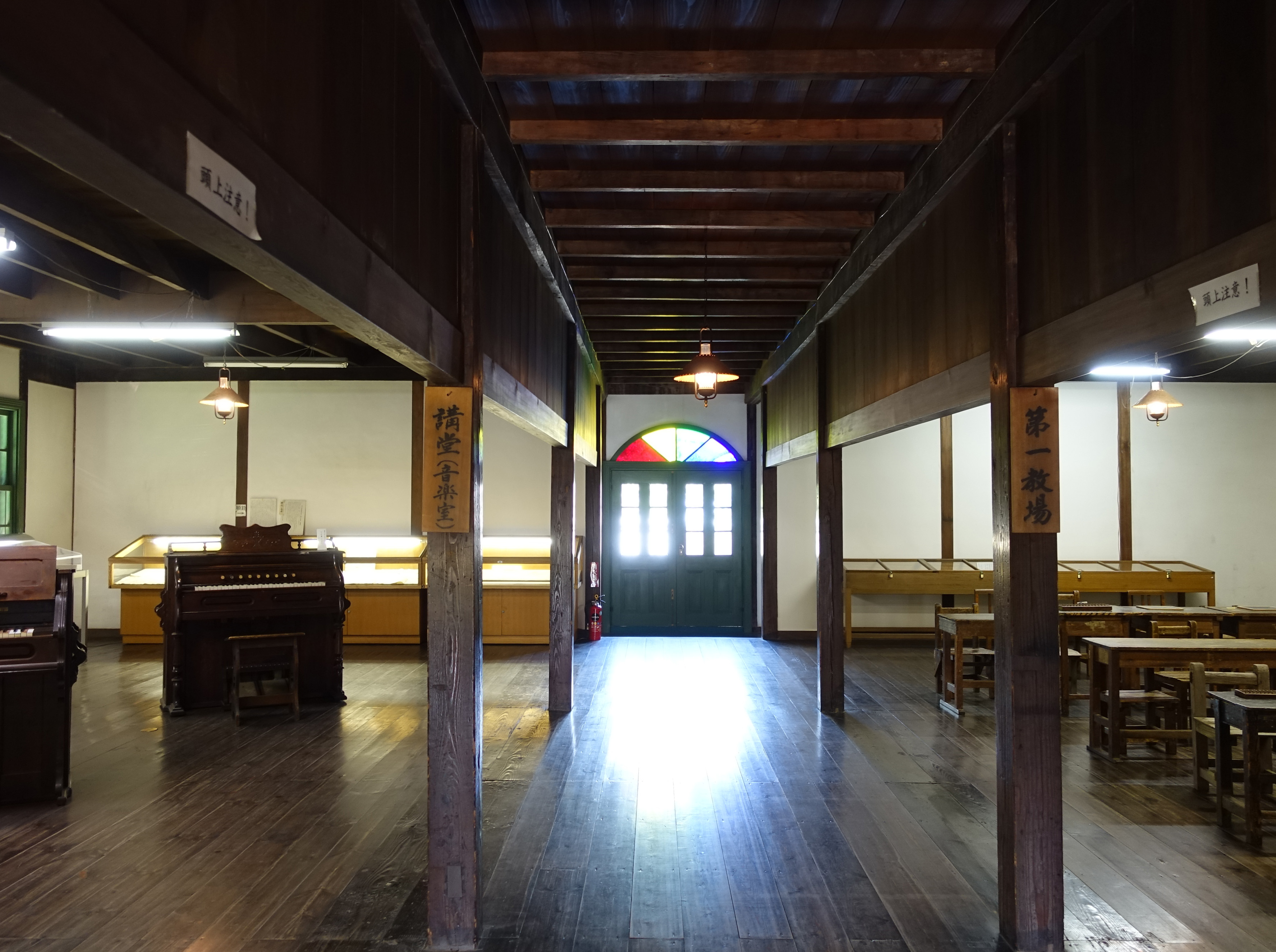 旧中込学校1階（耐震補強後）